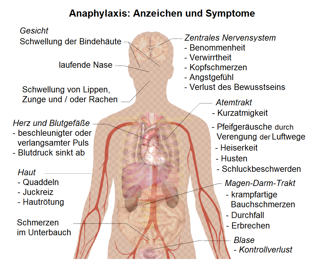 Anaphylaxis: Anzeichen und Symptome